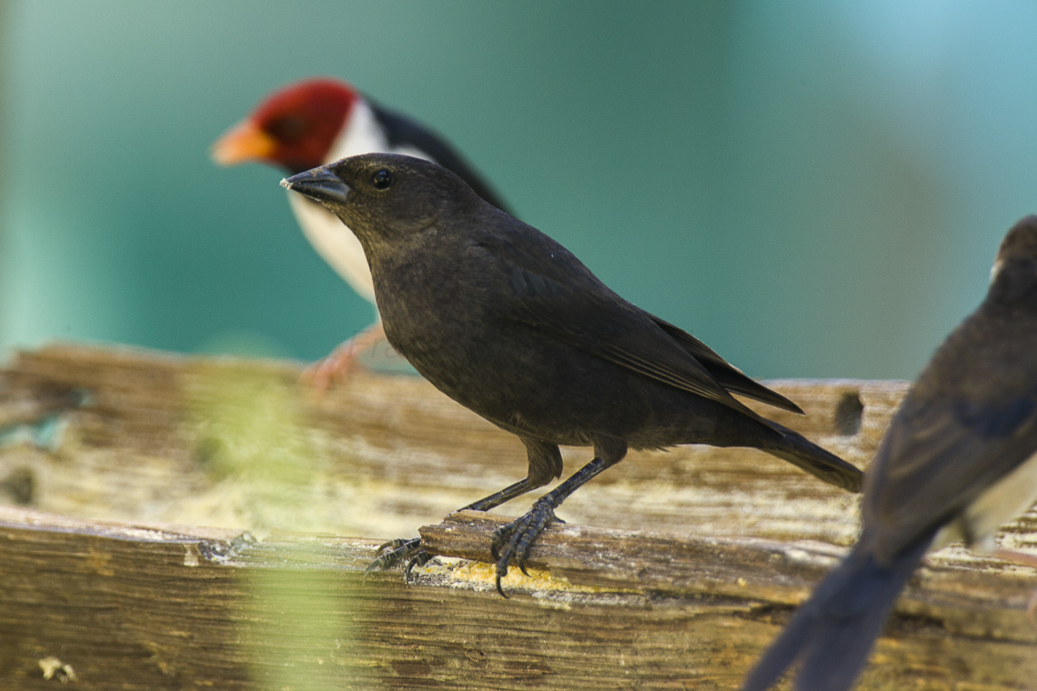 Chopi Blackbird - Pantanal - Brazil_H8O0748